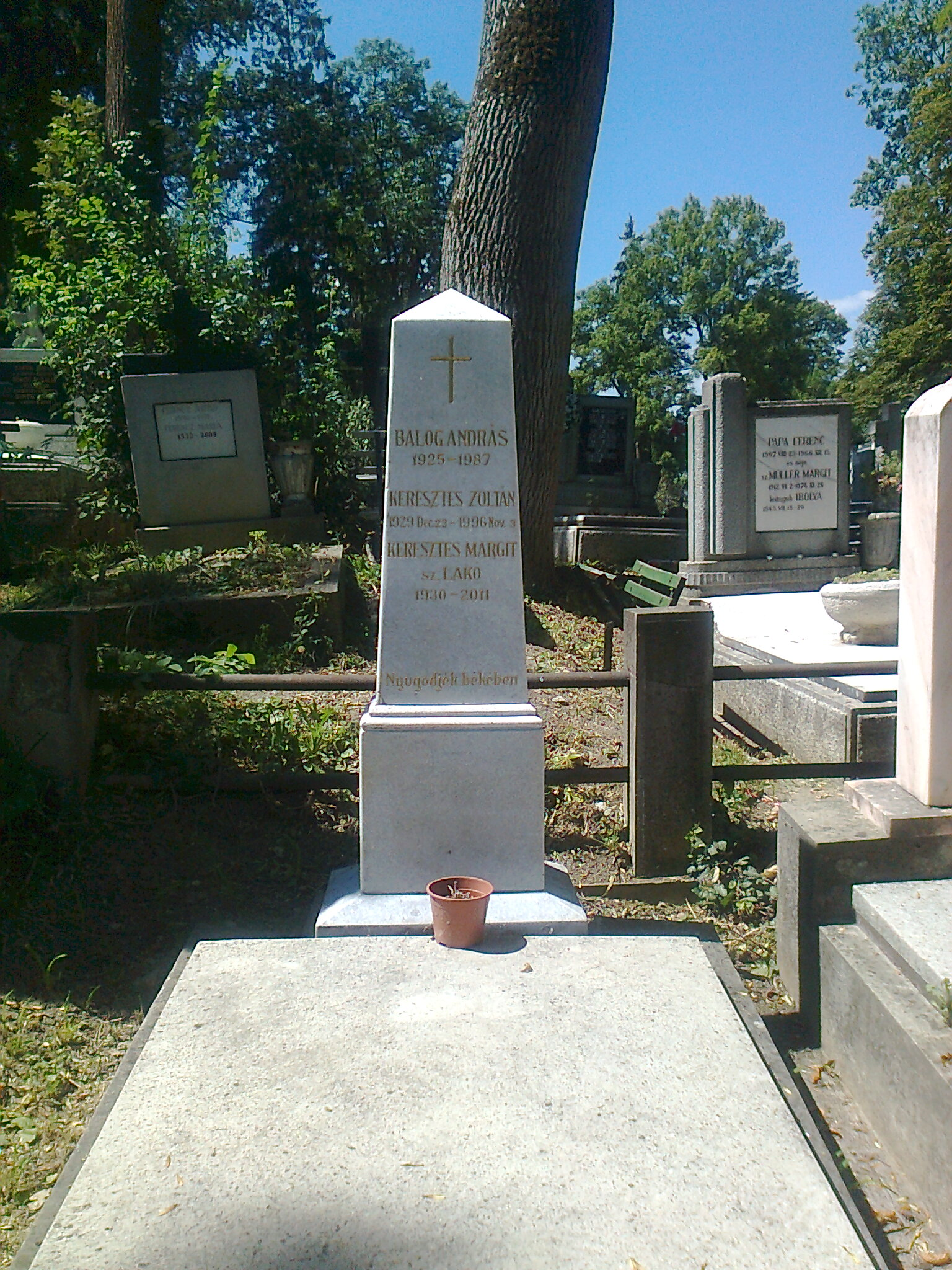 Keresztes Zoltán sírja (Kolozsvár, Házsongárdi temető)